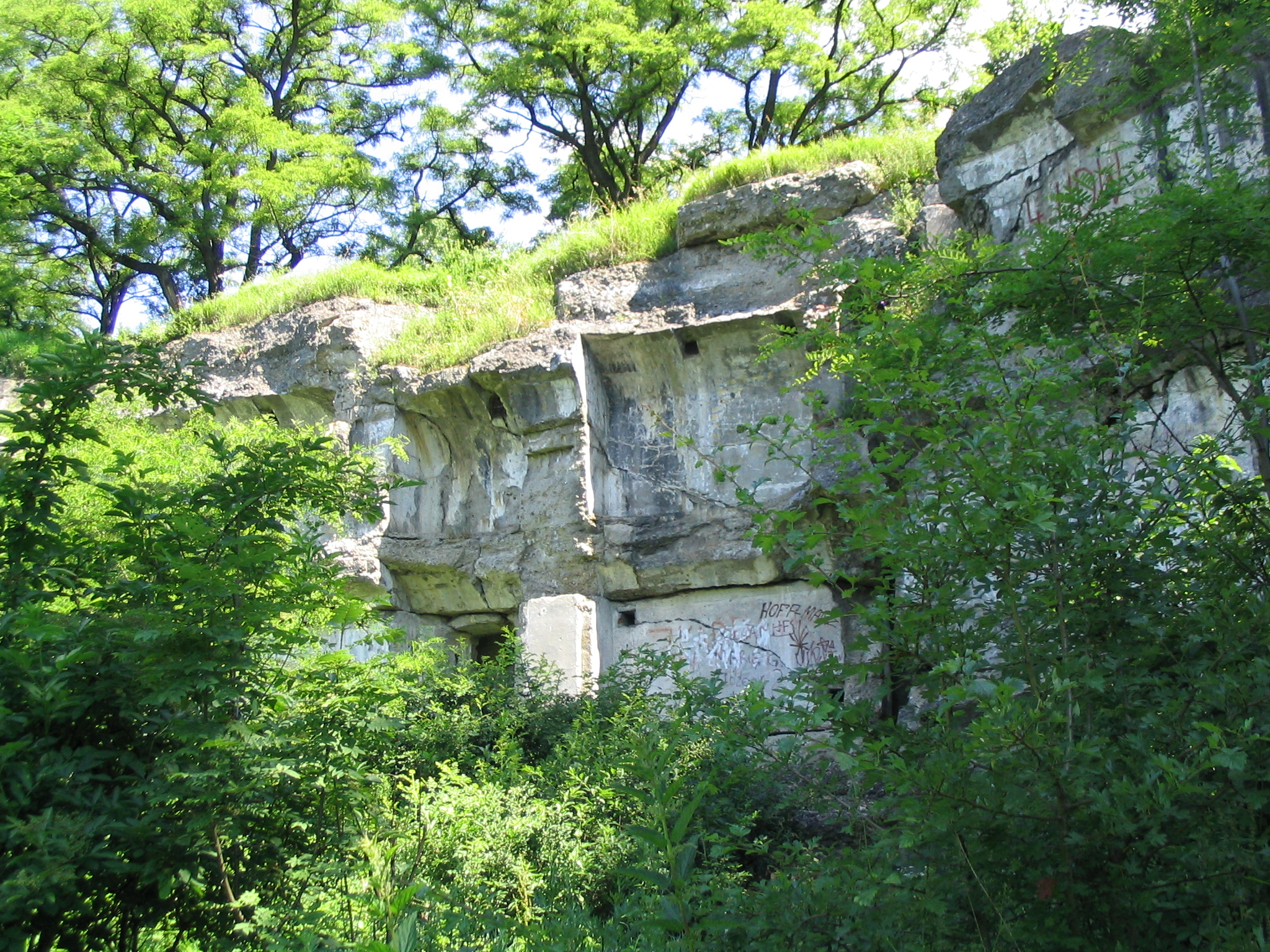 Fort XIII "San Rideau" Autor: Goku122